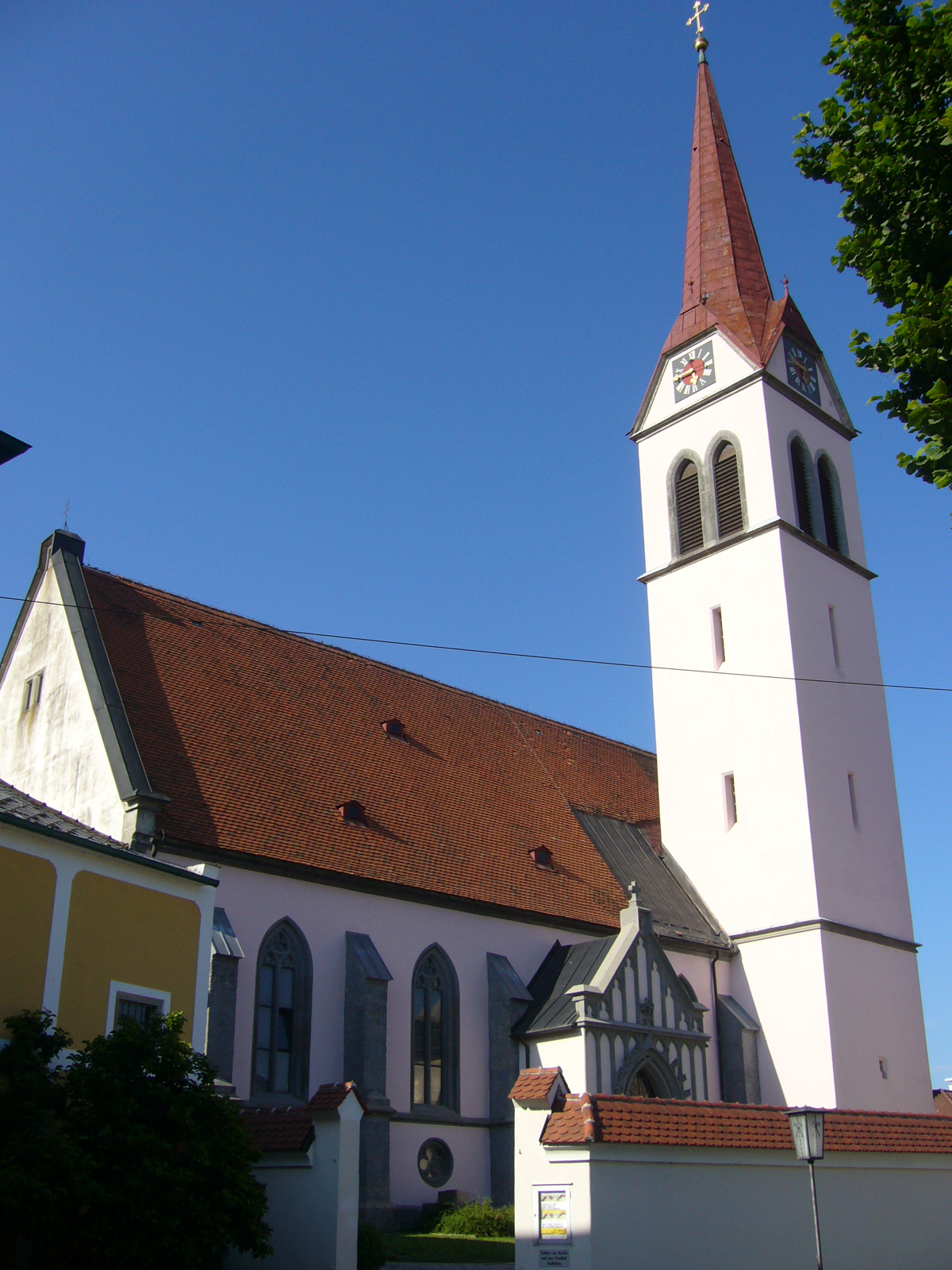 Weistrach aussen